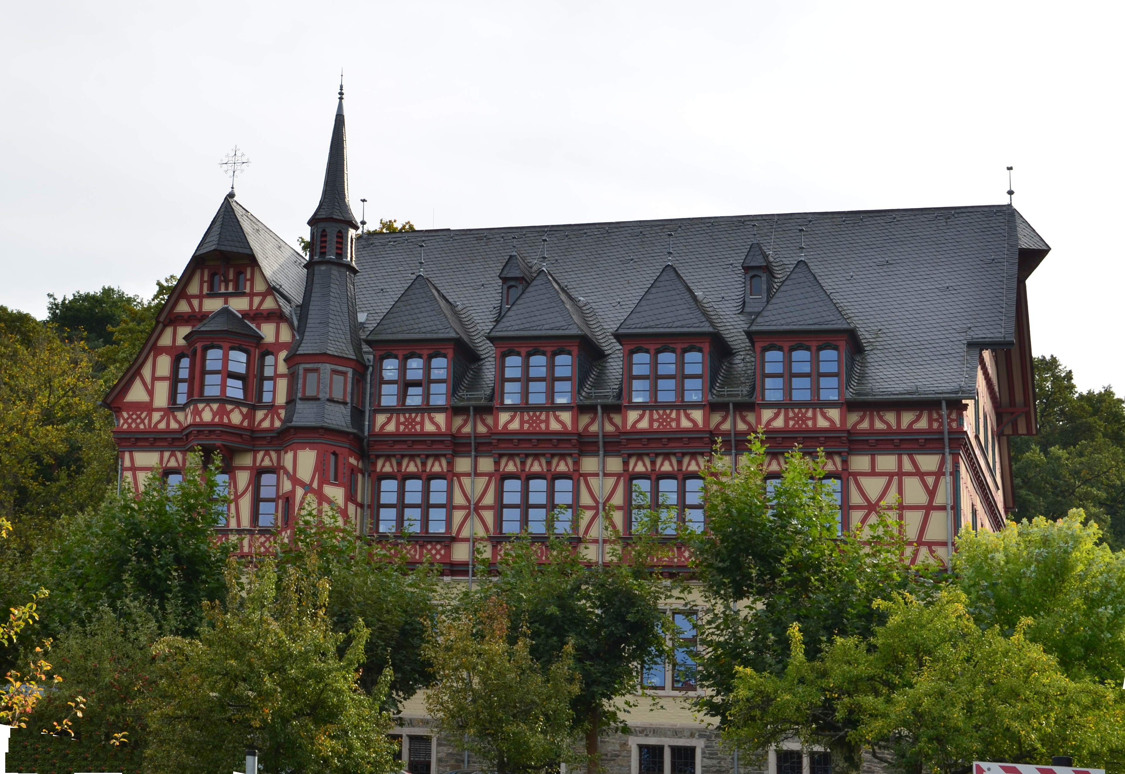 heilpädagogisches Kinderheim Vincenzhaus in Hofheim am Taunus, Vincenzstraße 29; eröffnet 1888